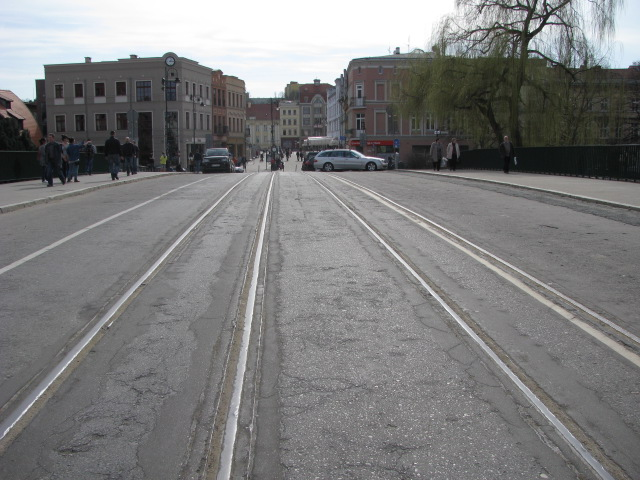 Most Jerzego Sulimy-Kamińskiego